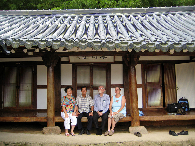 (Photos: Anyongdang, Gurim village)